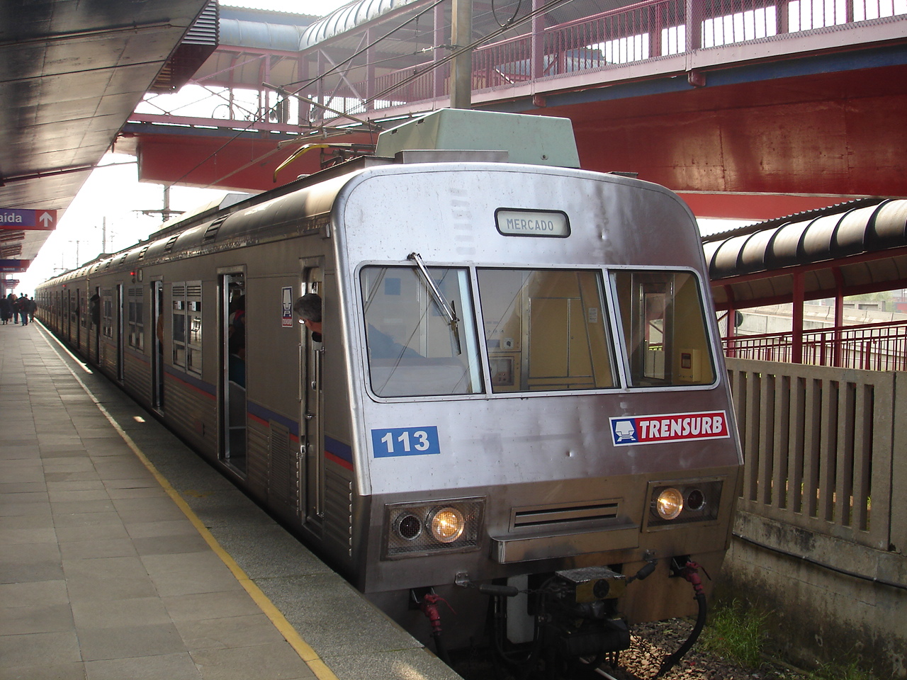 TUE TRENSURB nº113, seguindo sentido Mercado, Estação Aeroporto - Canoas - RS - Brasil